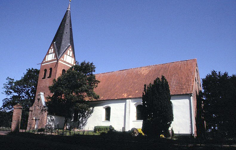 Aventoft Kirke i Sydslesvig. Aventoft kirke